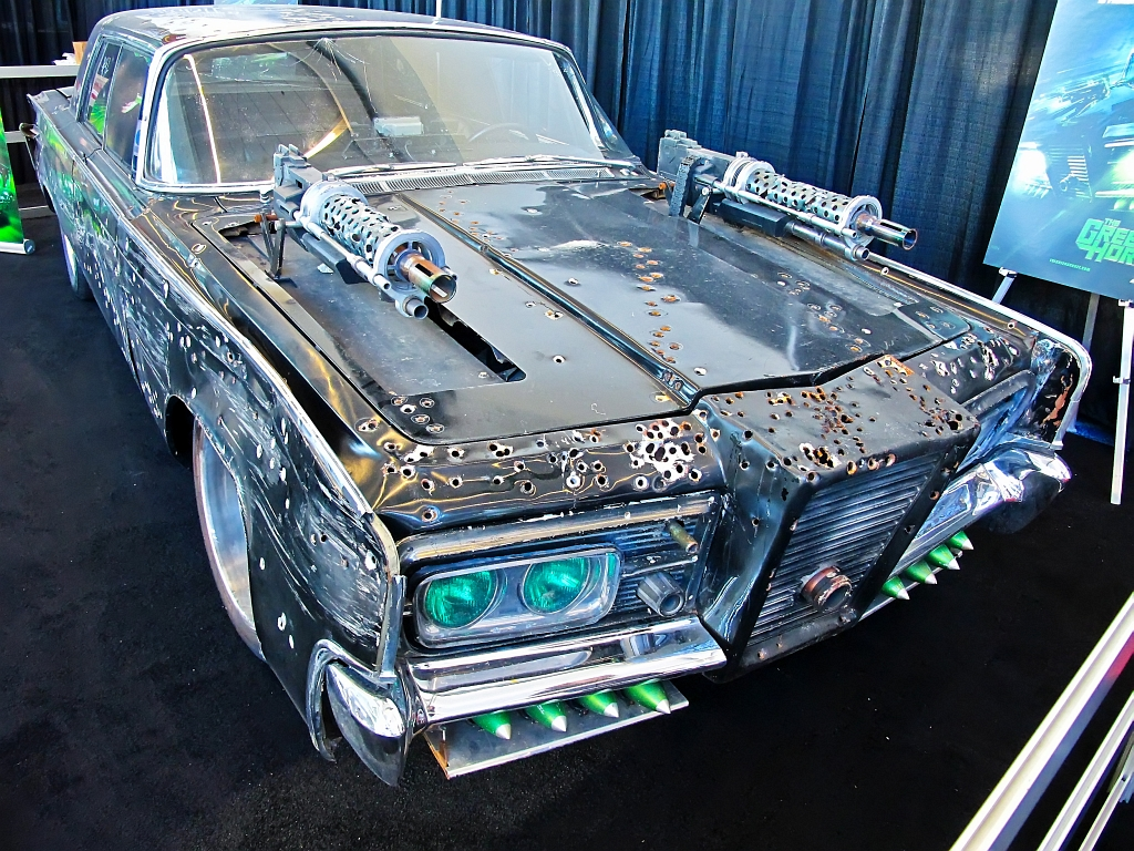 Voiture du film Green Hornet